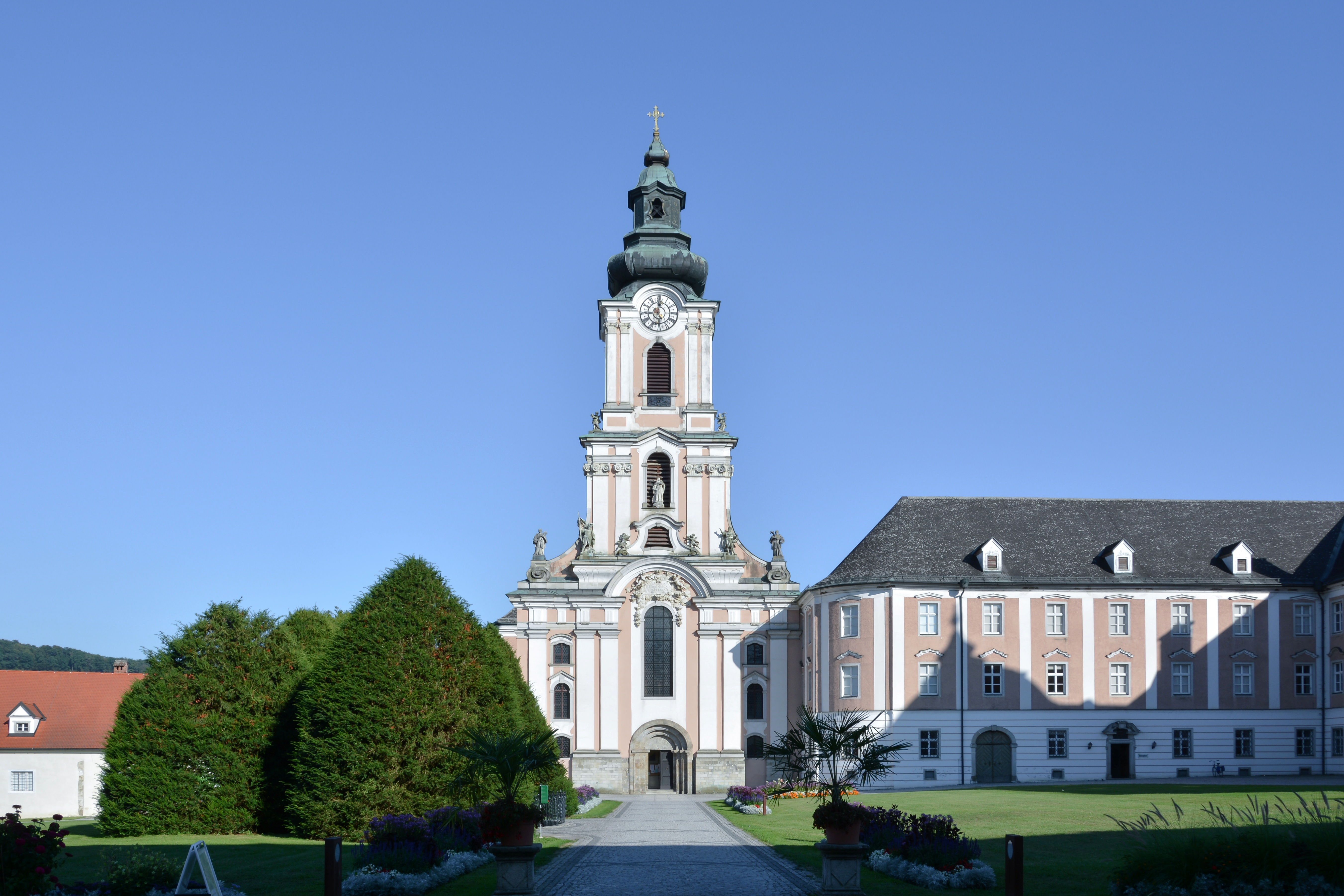 Gesamtanlage Zisterzienserkloster Wilhering, Stiftskirche